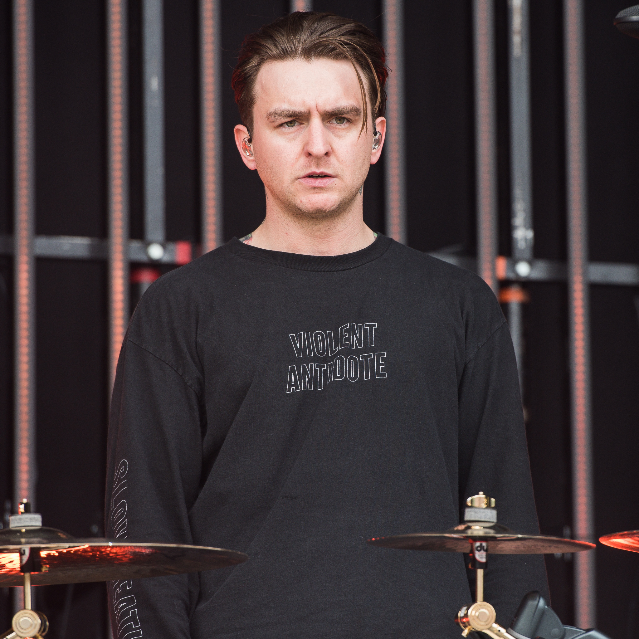 ARGO-Konzerte,Bring Me The Horizon,Festival,Konzert,Livekonzert,Livemusik,Matt Nicholls,Musik,RiP,Rock im Park 2016,Seat Zeppelin Stage